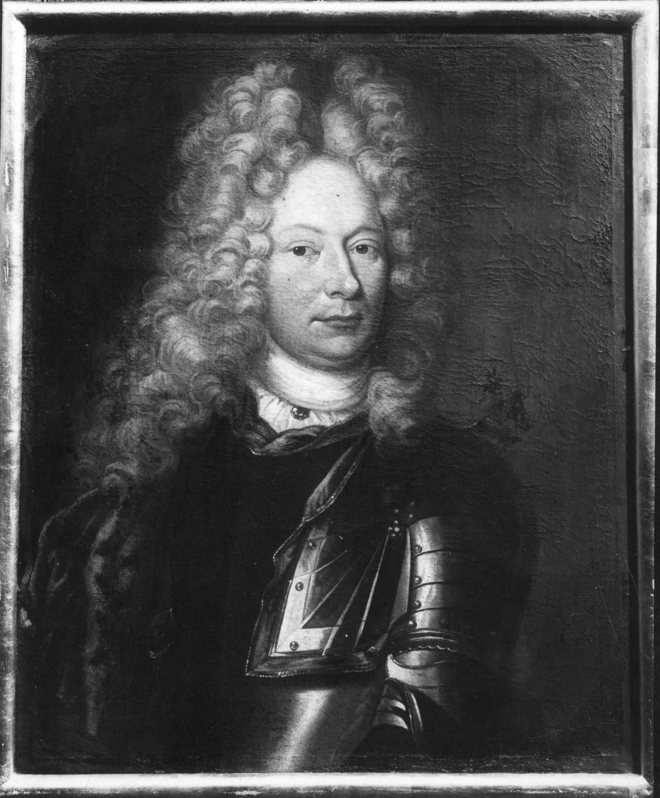 Amtmann Niels Werenskiold (tidligere Wernersen)